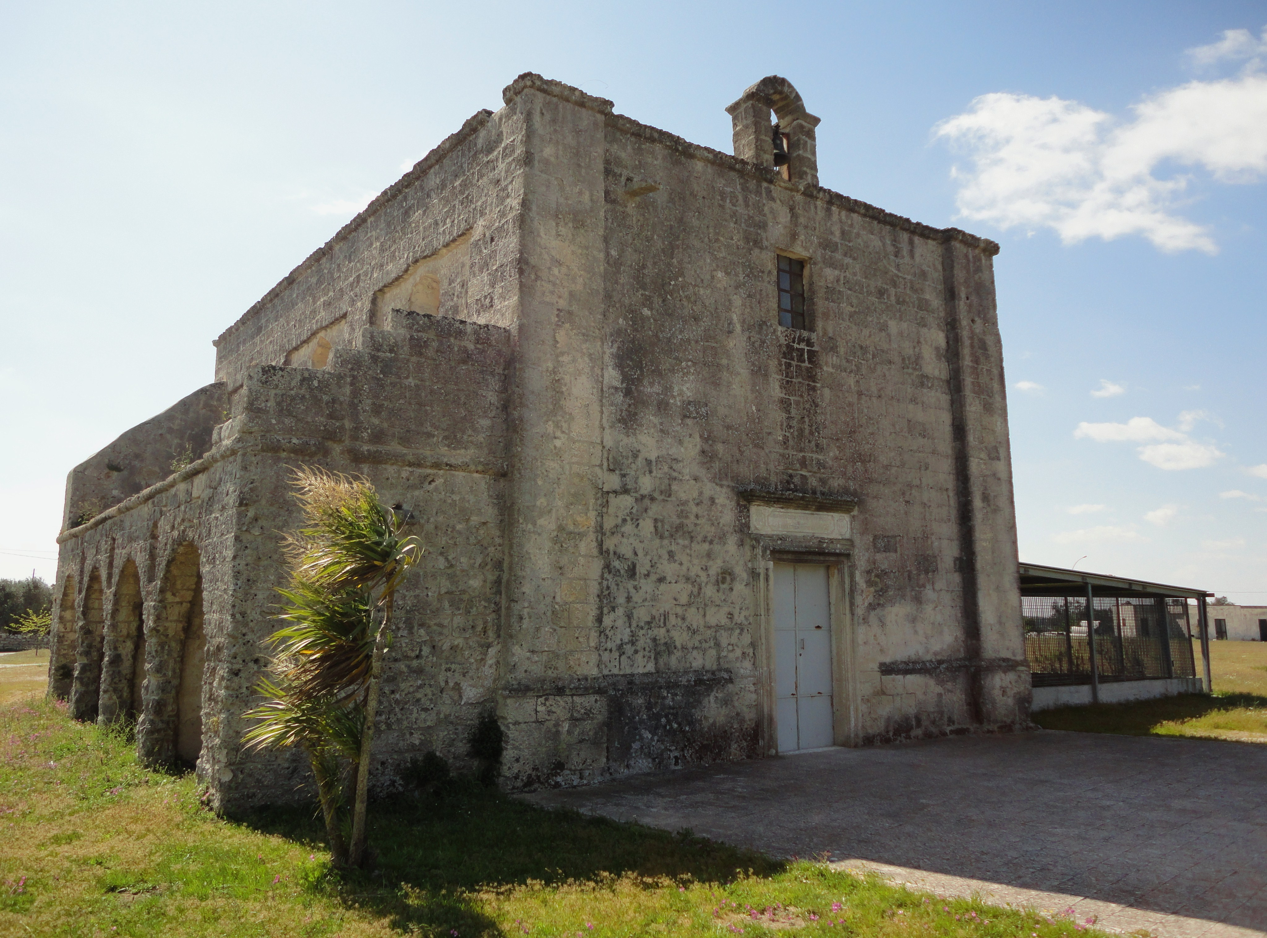 Cappella di San Vito e Marina Ortelle